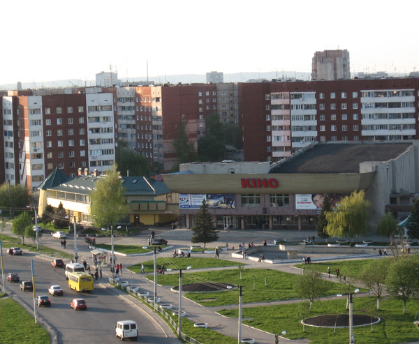 Dovzhenko cinema in Lviv